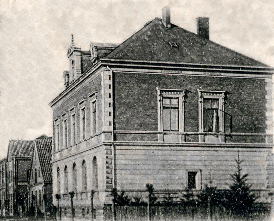 historischer Aufnahme einer Nebenstelle der Reichsbank in der Moltkestraße in Gütersloh, von 1985/86 bis 1990/91 Sitz der Bertelsmann Stiftung, gescannt von einer Postkarte